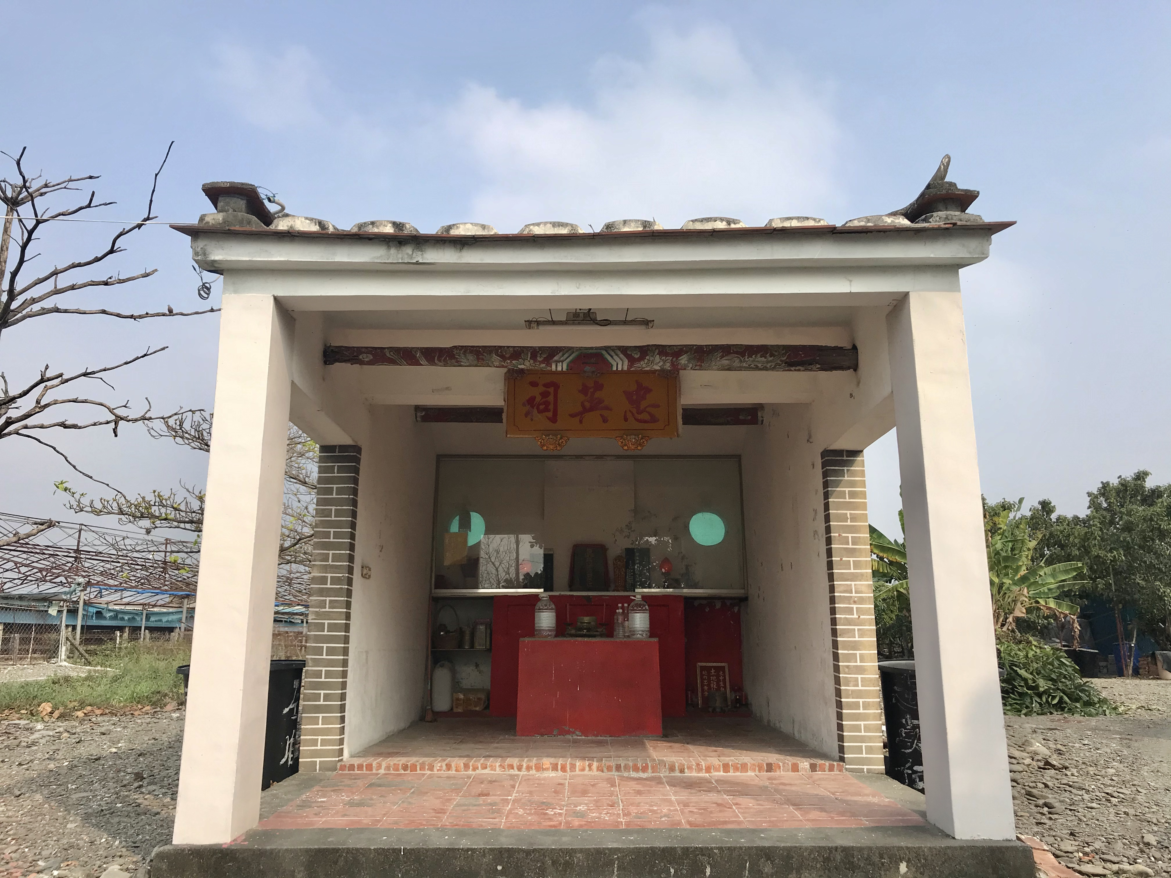 忠英祠正面照